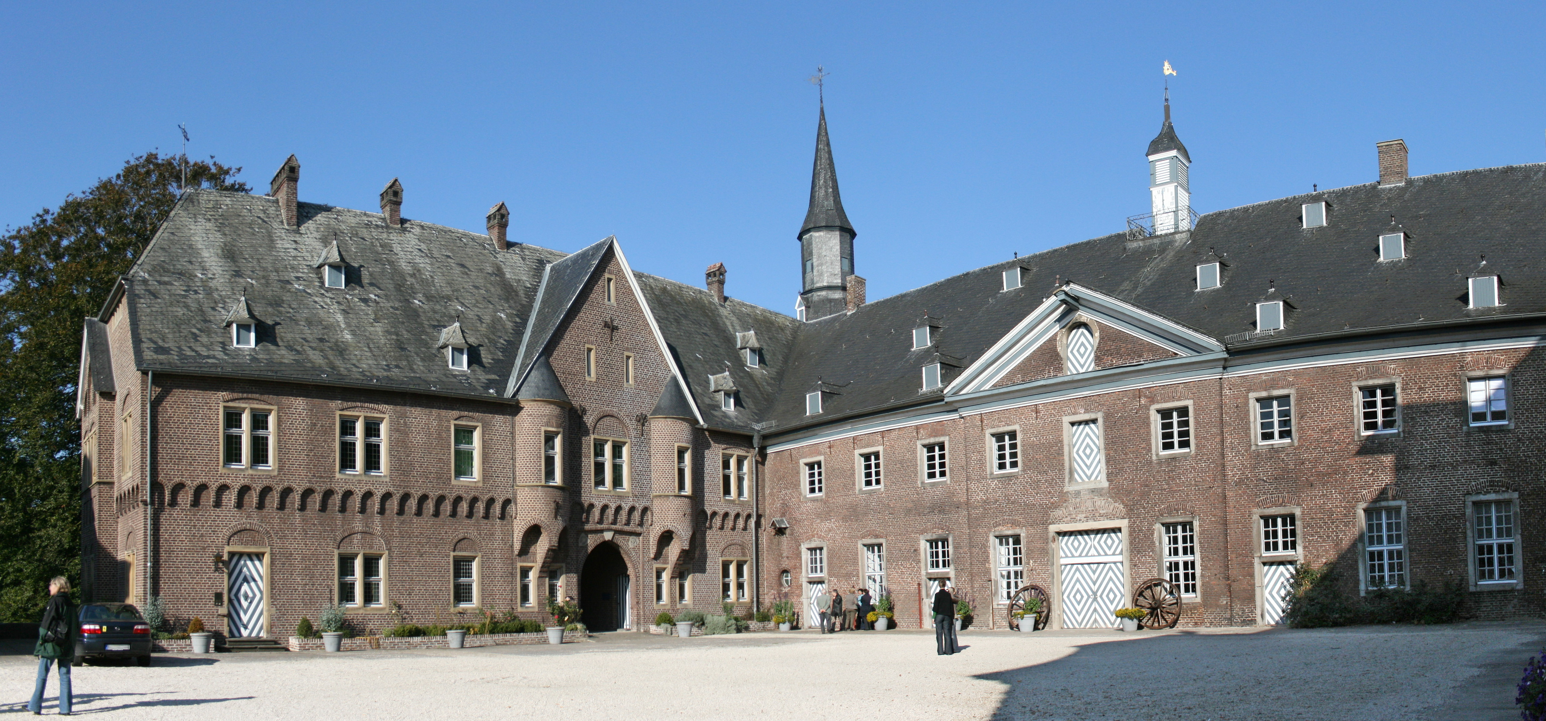 Vorburg des Schlosses Wissen in Weeze This image was created with Hugin